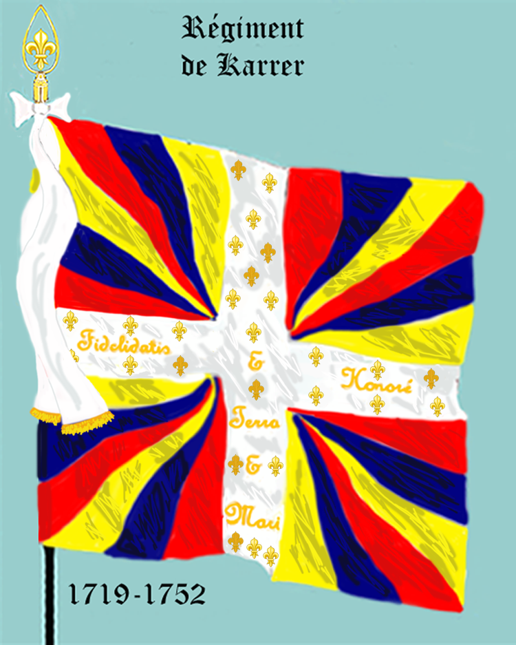 Ordonnanzfahne eines Fremdenregiments im königlich französischen Dienst. (Schweizer Regiment) - Entnommen und überarbeitet aus: „LES UNIFORMES ET LES DRAPEAUX DE L'ARMÉE DU ROI“ Marseille 1899. - Drapeau d'Ordonnance d' un régiment étranger au service française (régiment suisse.)